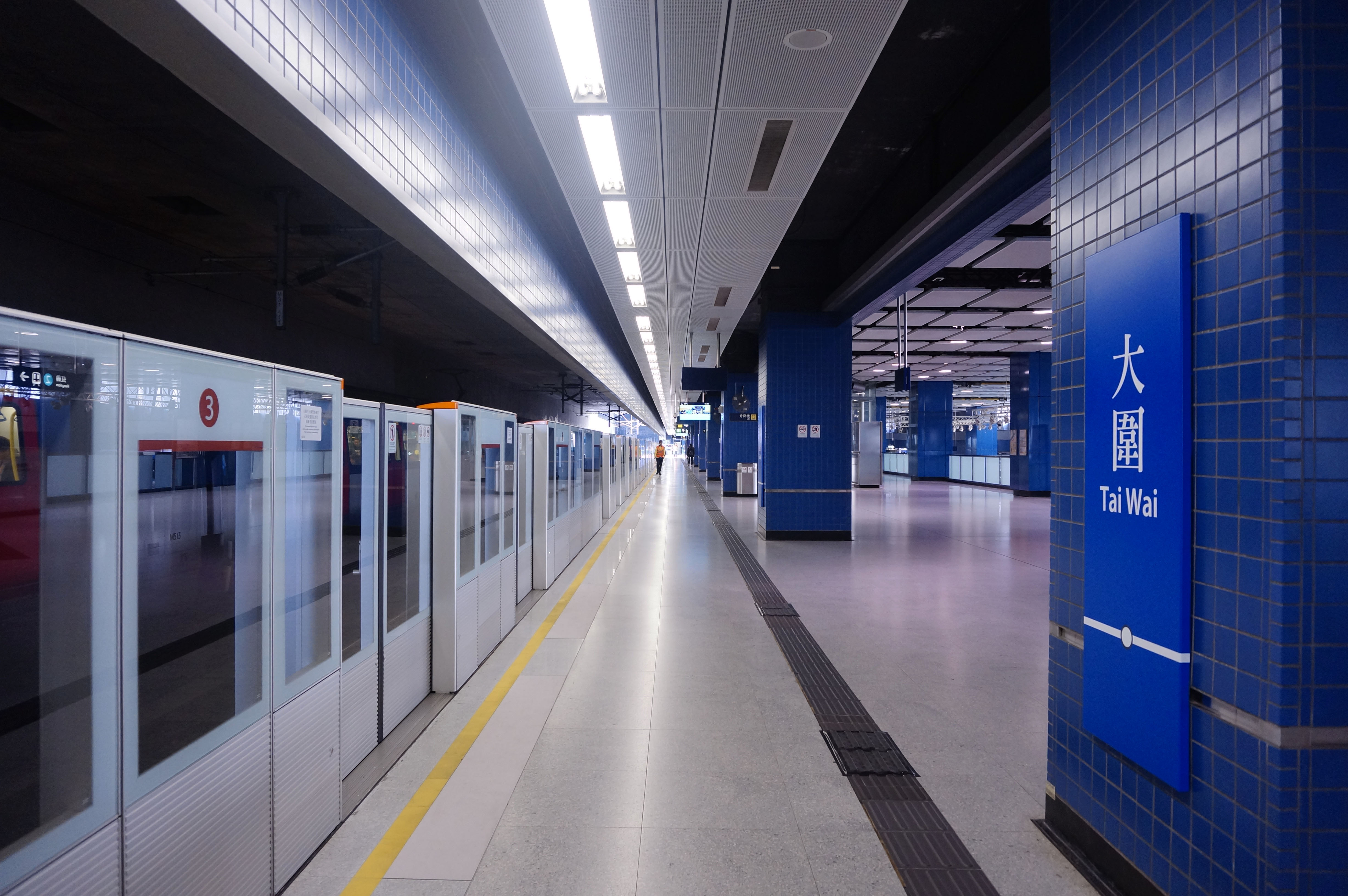 港鐵大圍站